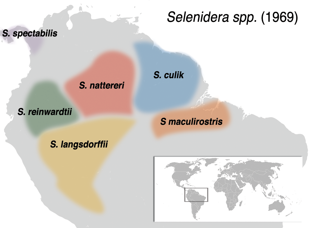 Distribution of six species of Selenidera as of 1969: Selenidera culik (now Selenidera piperivora) Selenidera langsdorffii (now Selenidera reinwardtii langsdorffii) Selenidera maculirostris Selenidera nattereri Selenidera reinwardtii Selenidera spectabilis